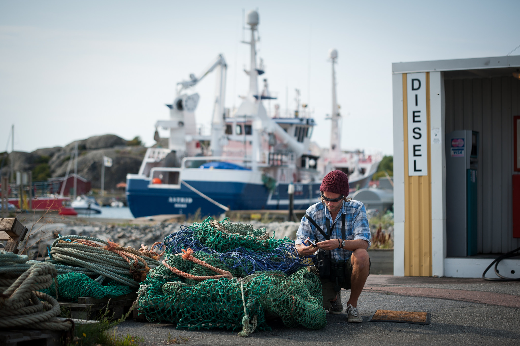 Photo © Chris Grodotzki / The Black Fish.